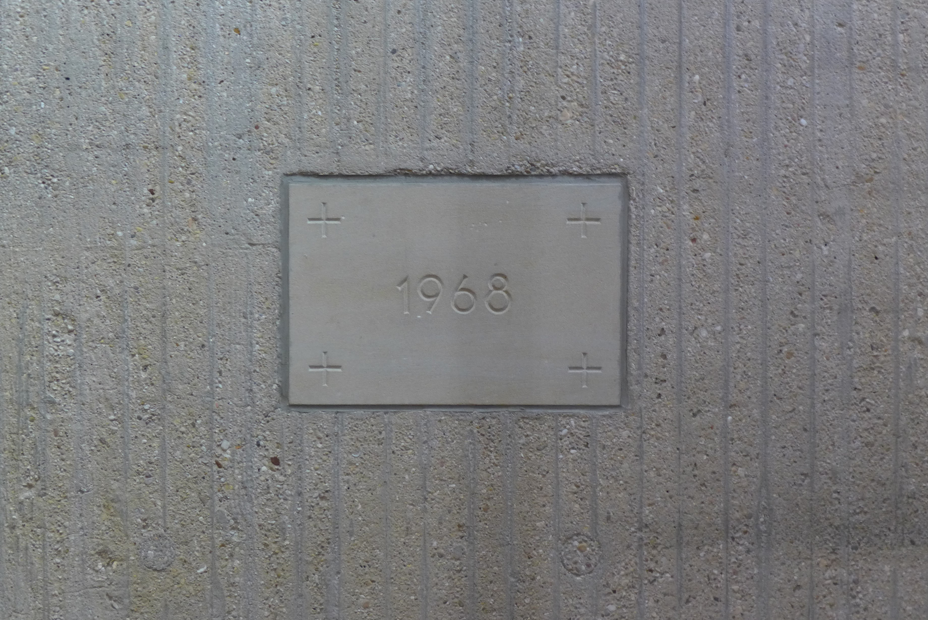 St. Ludwig (Saarlouis), Grundstein des Kirchenneubaues